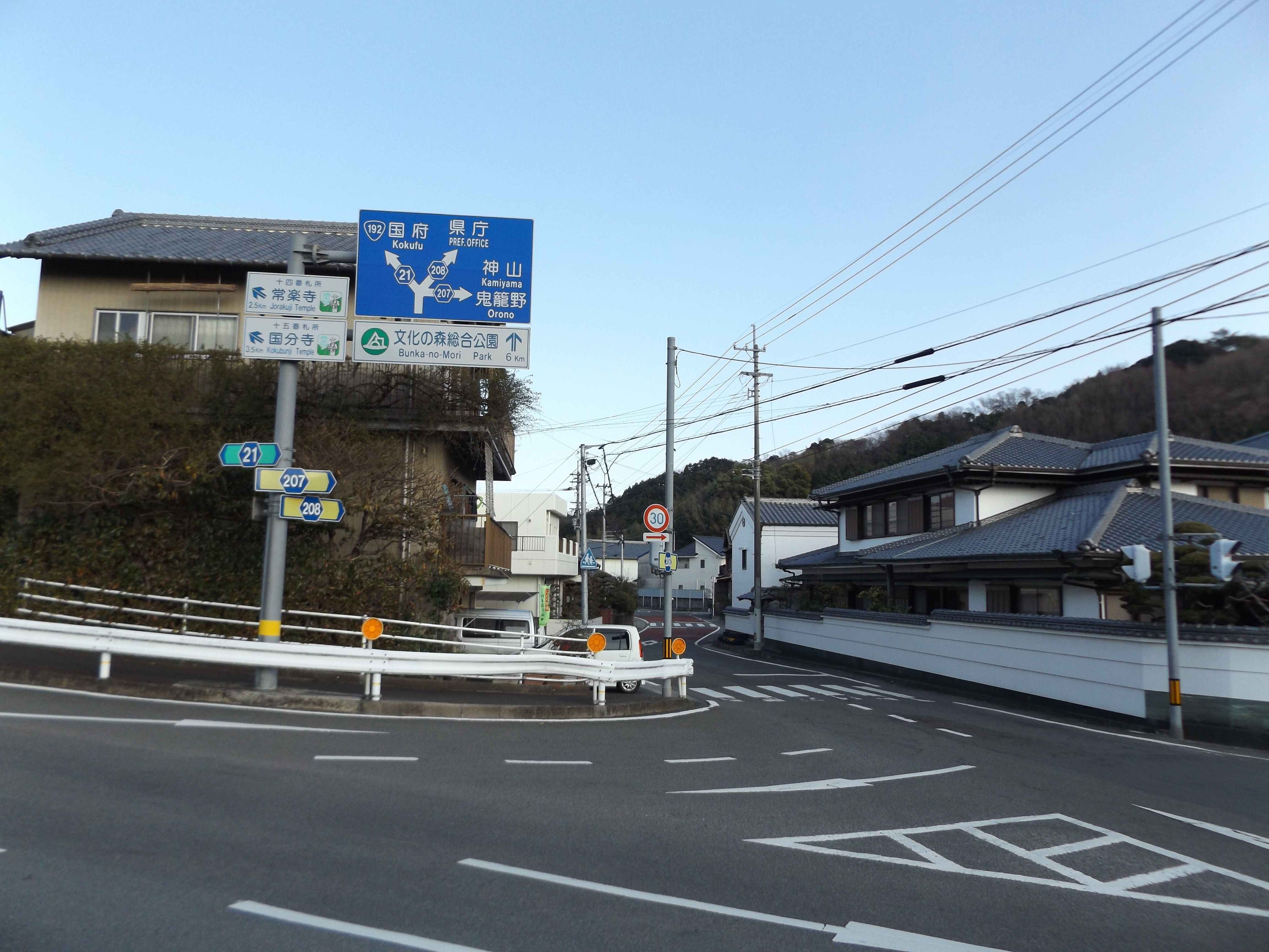 徳島市一宮町にある、徳島県道208号一宮下中筋線の起点である、徳島県道21号神山鮎喰線および徳島県道207号鬼籠野国府線との交差点。